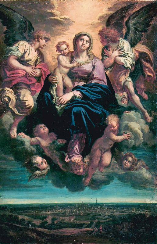 Madonna in Gloria sulla città di Bologna (da Annibale Carracci)